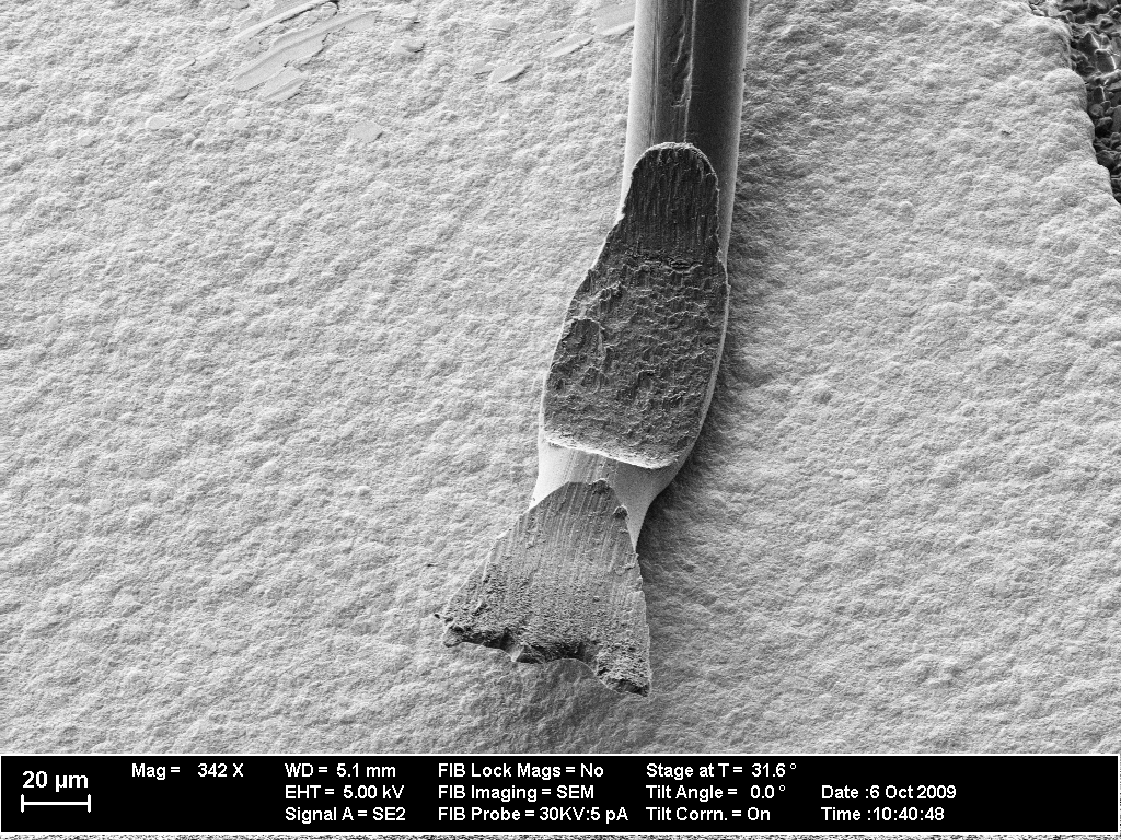 SEM-Aufnahme des ersten Wedge-Bonds eines Ultraschall-Wedge-Wedge-Bondes mit einem Al-Draht auf einem Chip-Carrier.